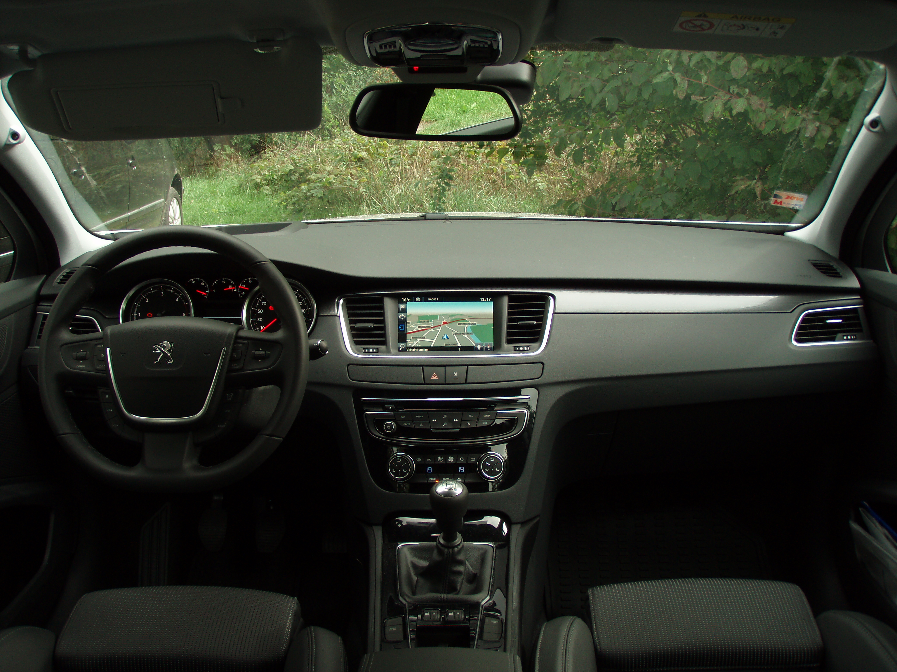 Peugeot 508 facelift (2014) interior; system in Czech language